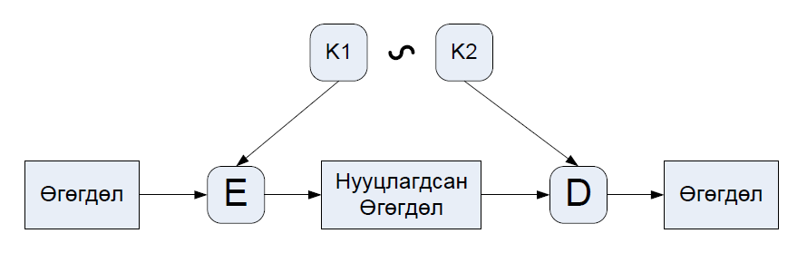 Монгол: Нийтийн түлхүүртэй алгоритм